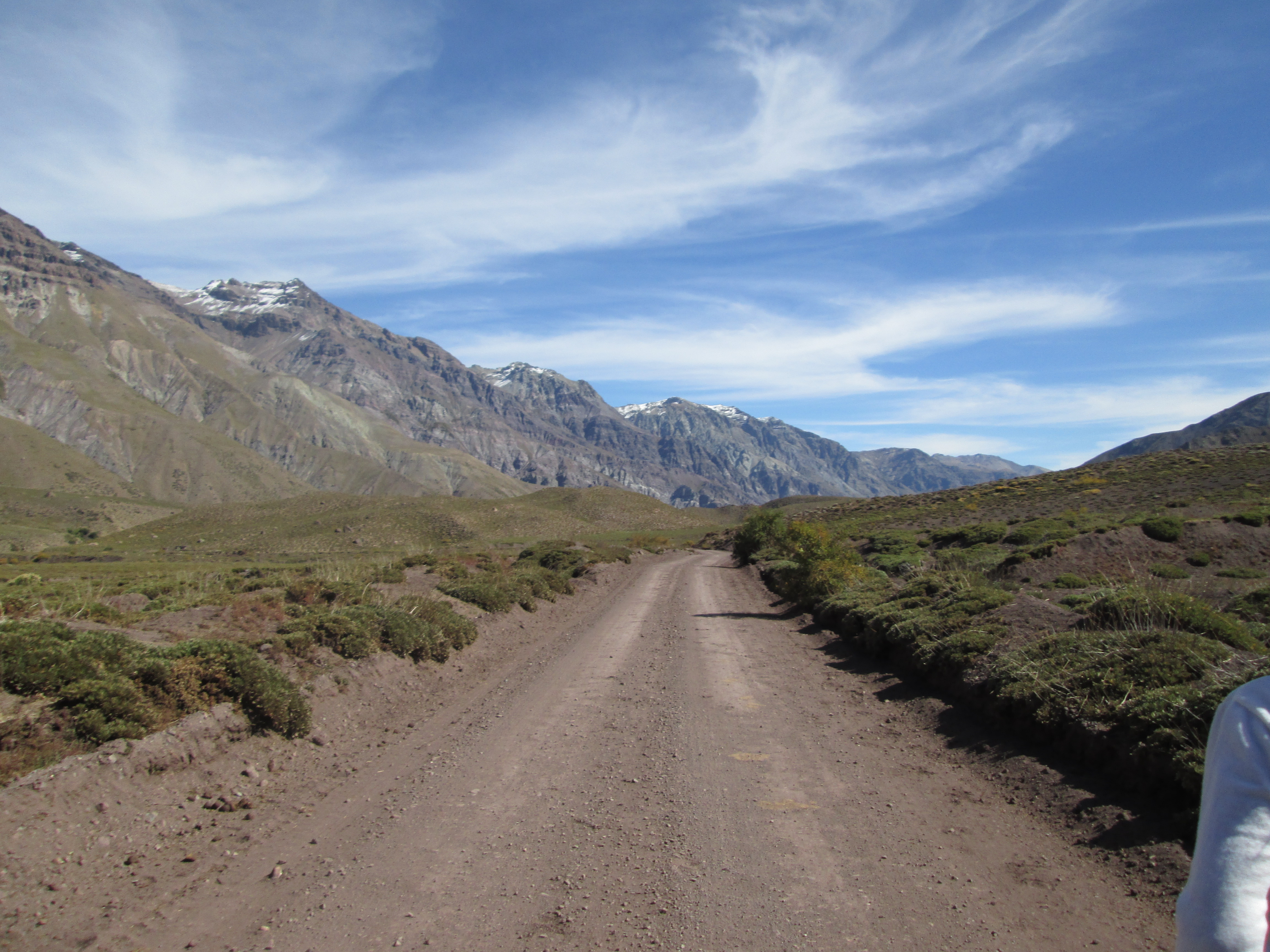 CAMINO DE TIERRA TERMAS DEL FLACO